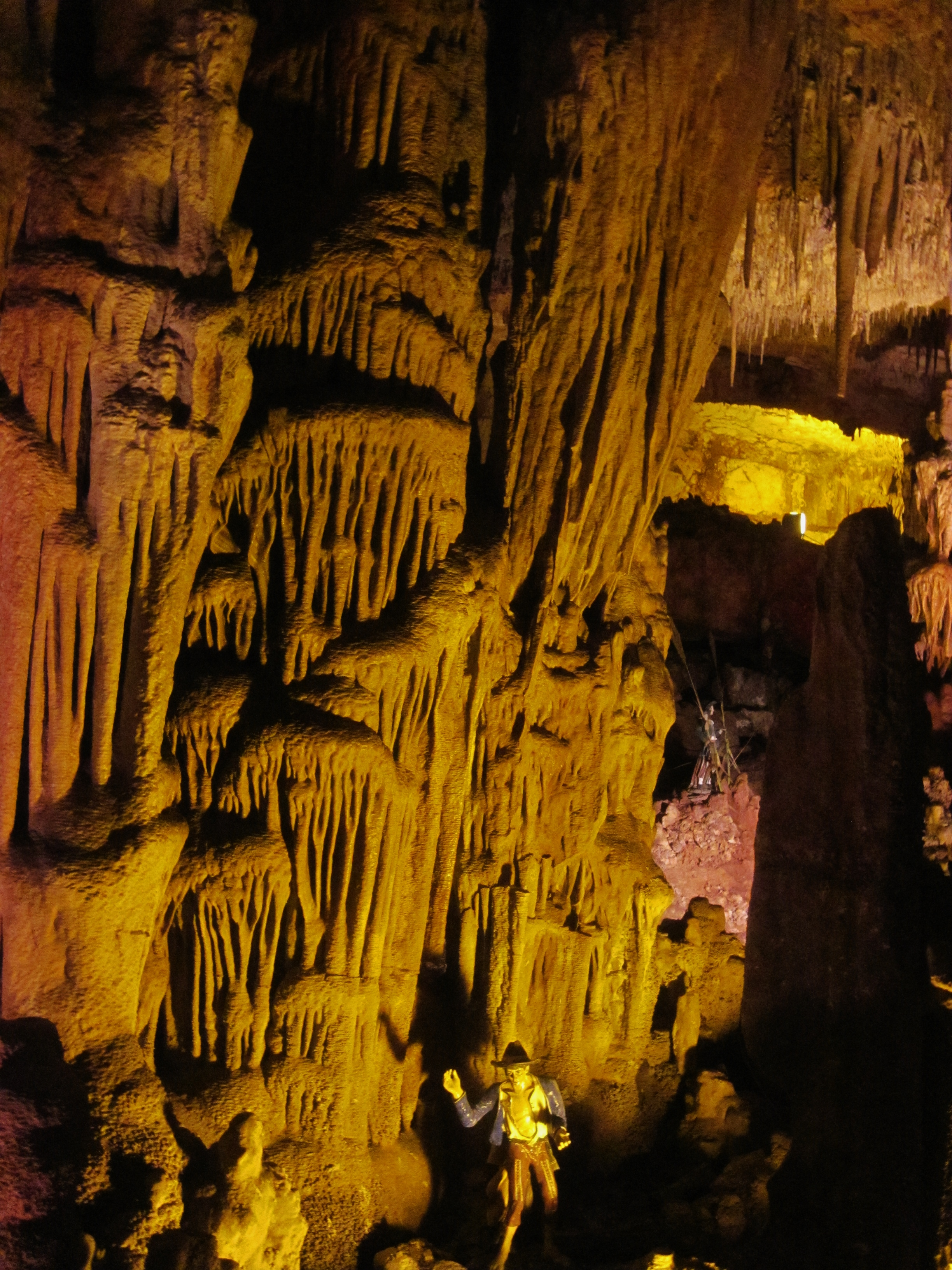 Colonna ottenuta dall'unione di stalagmiti e stalattiti all'interno della grotta di Montevicoli a Ceglie Messapica. Al di sotto una statua del tradizionale presepe allestito all'interno della grotta.